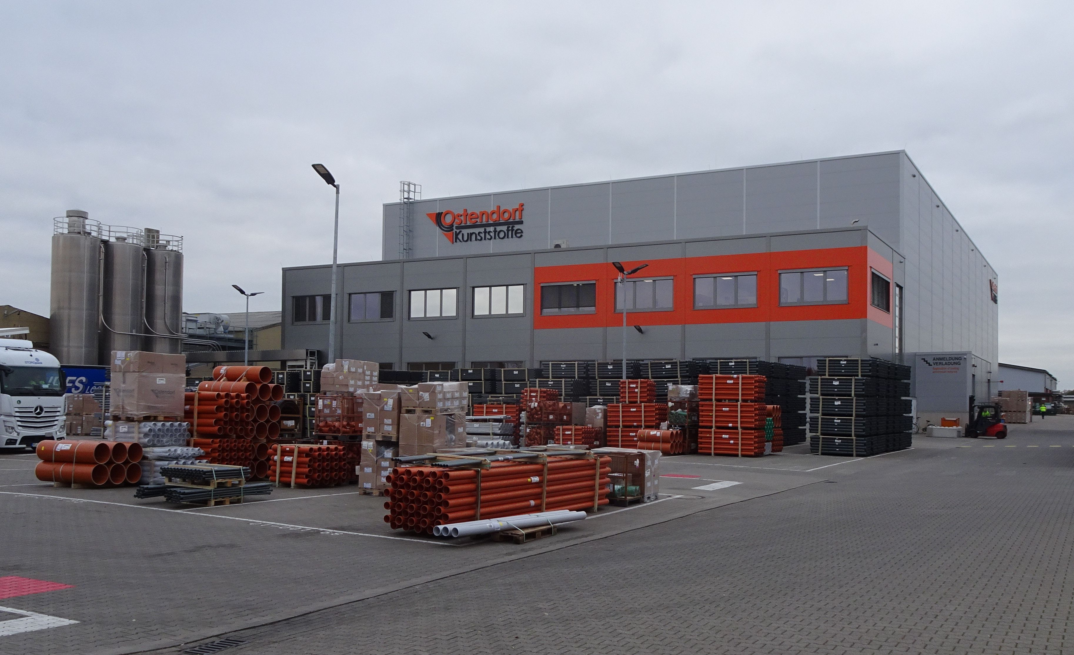 Ostendorf Kunststoffe in Vechta